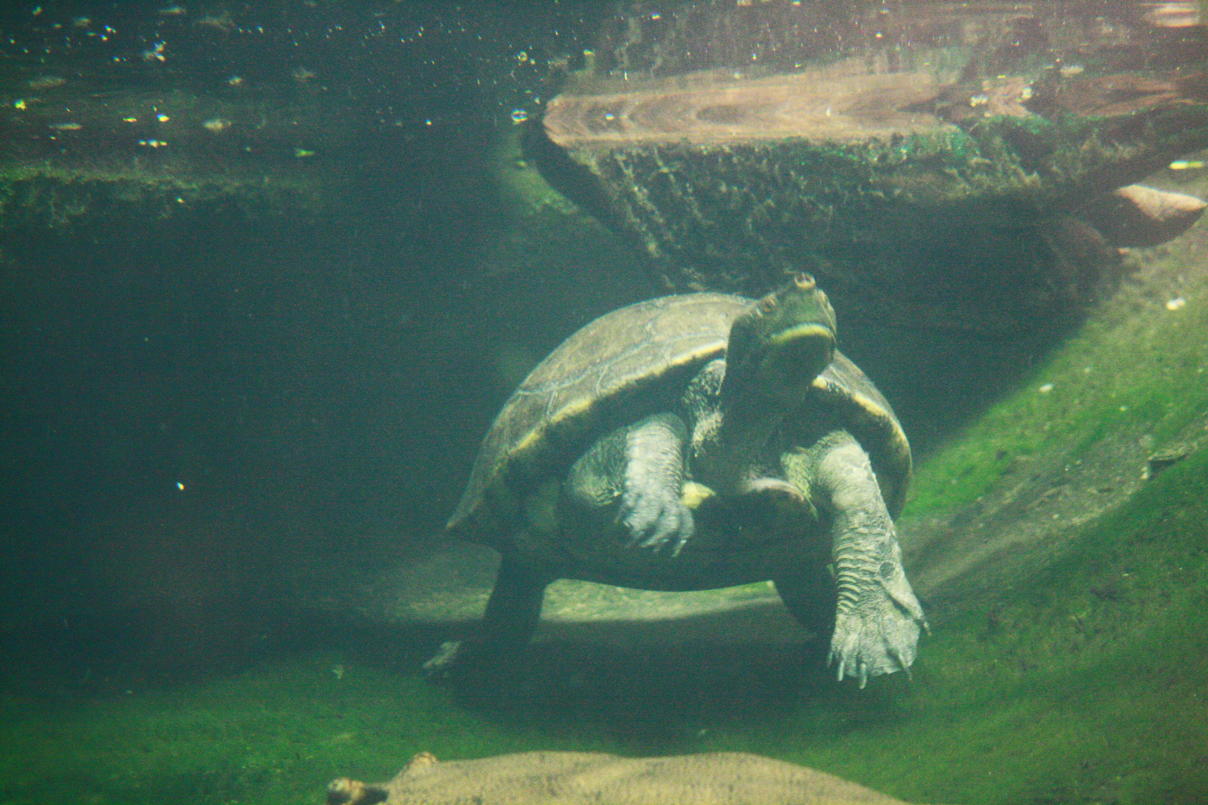 Zoo Praha